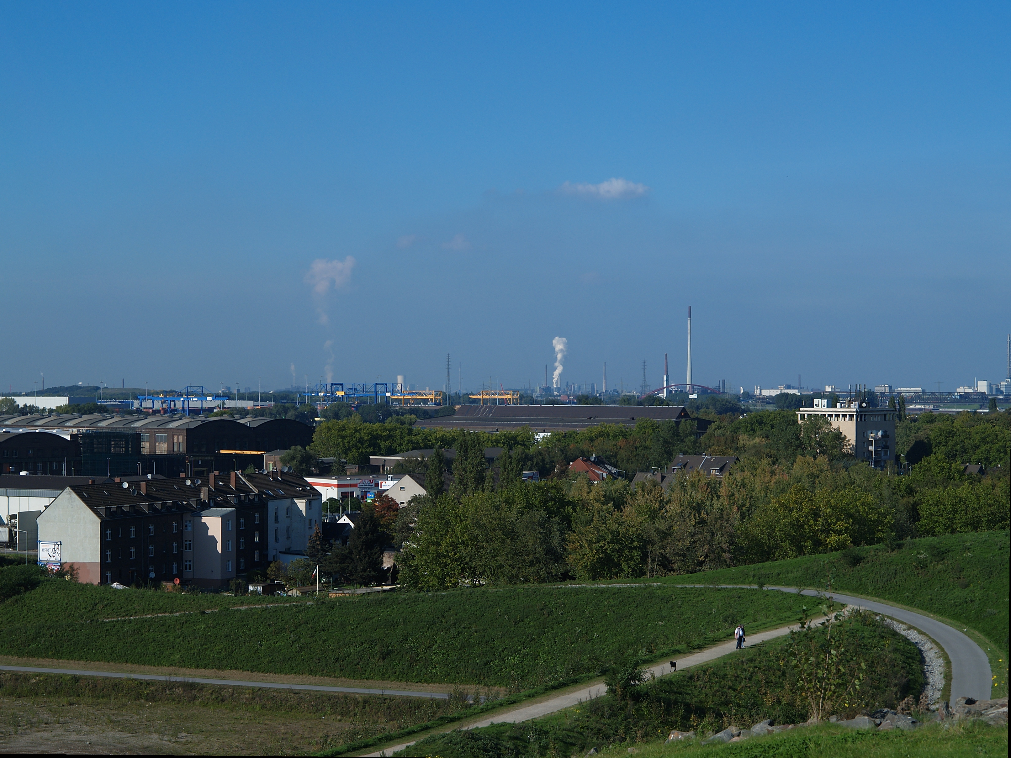 Blick von der Heinrich-Hildebrand-Höhe im Angerpark in Duisburg Wanheim nach Norden